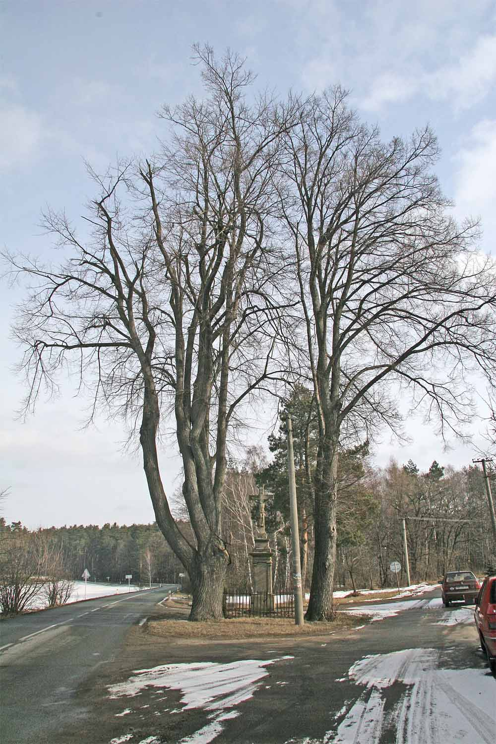 Boží muka na severovýchodním okraji obce Rokytno autor:Zp